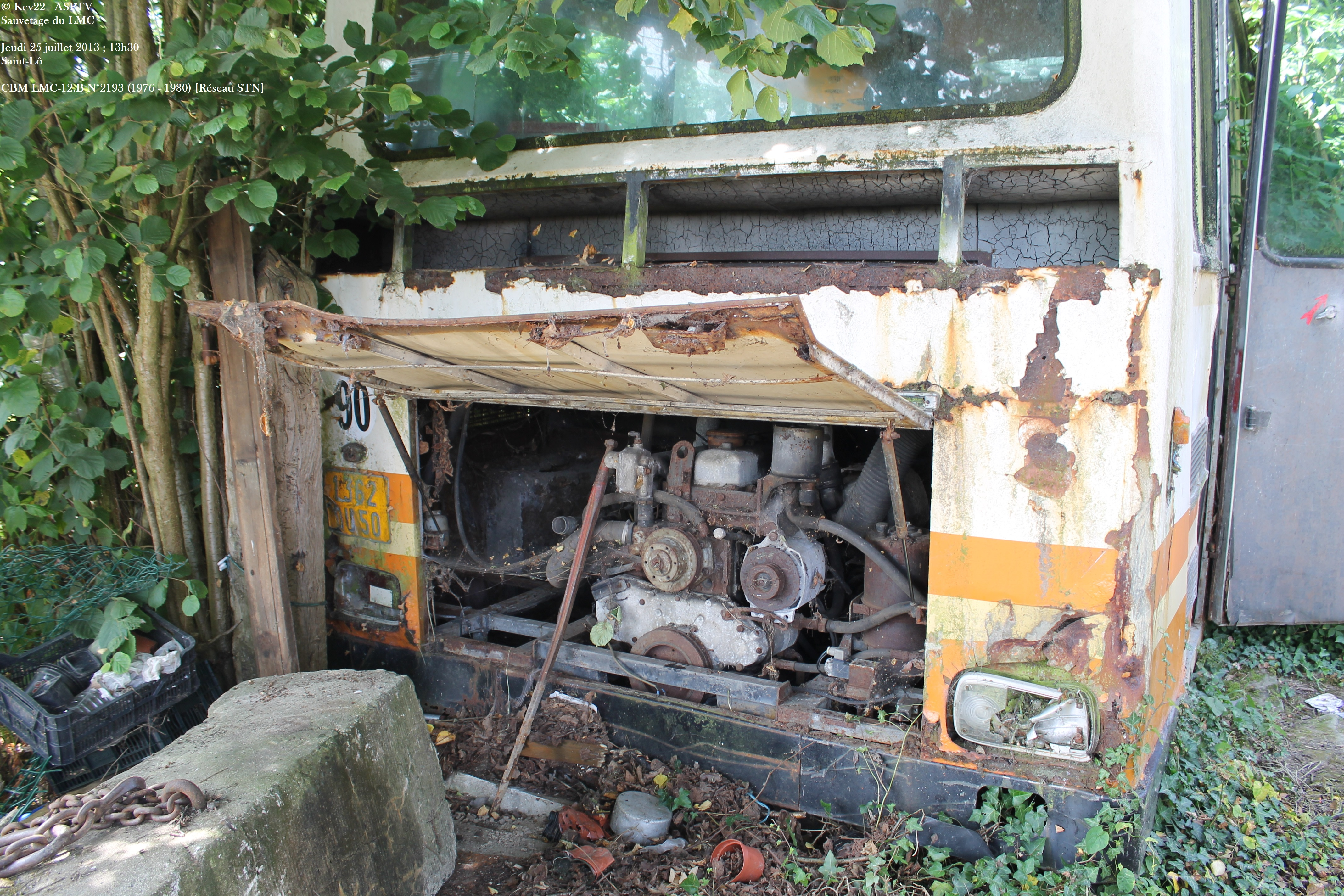 CBM LMC 12 - Arrière